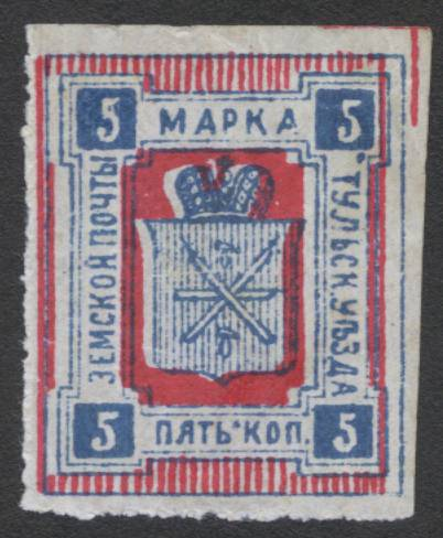 Земская марка. Тульский уезд № 1-а (1888 г.)